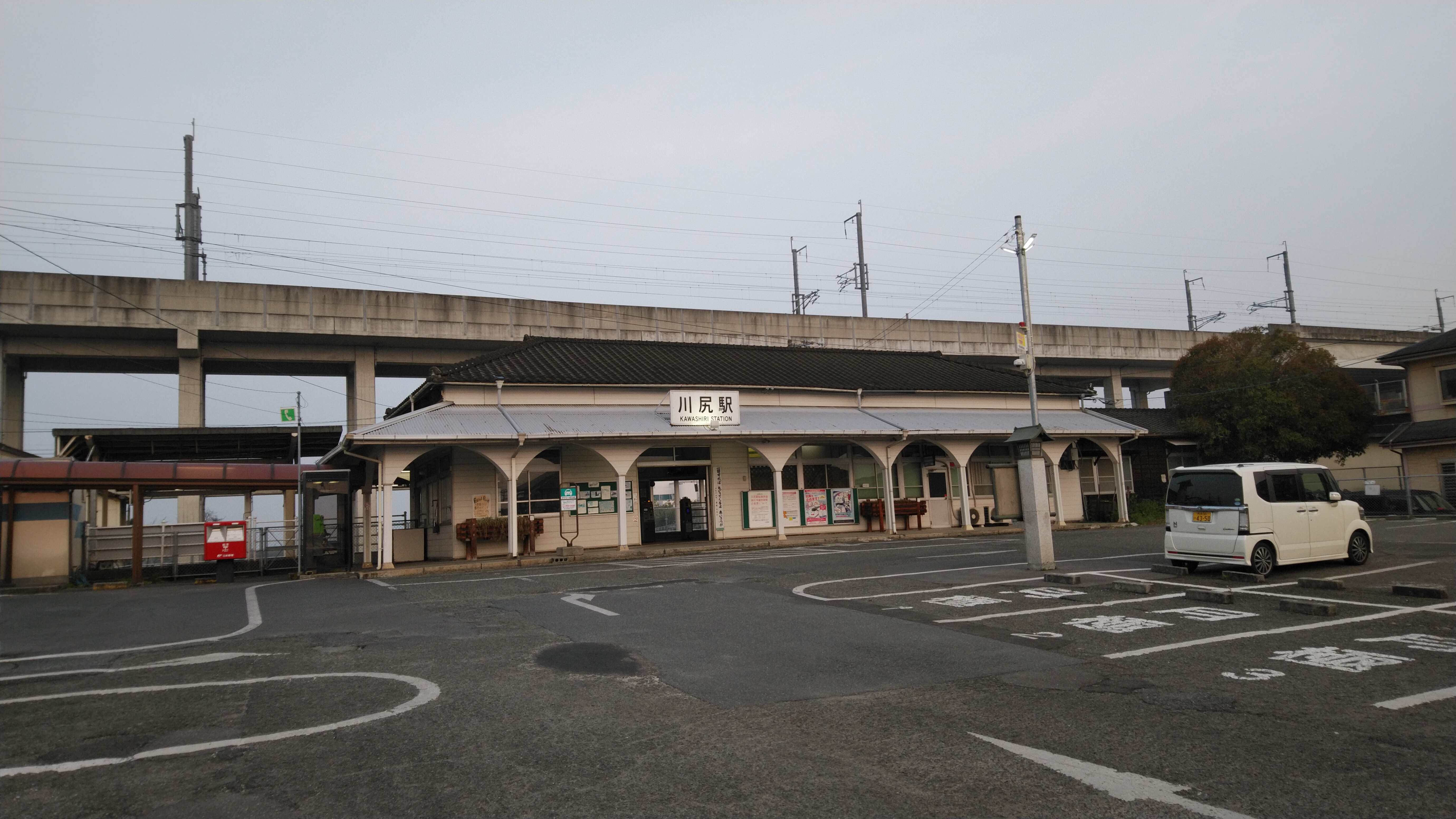 川尻駅舎と九州新幹線高架